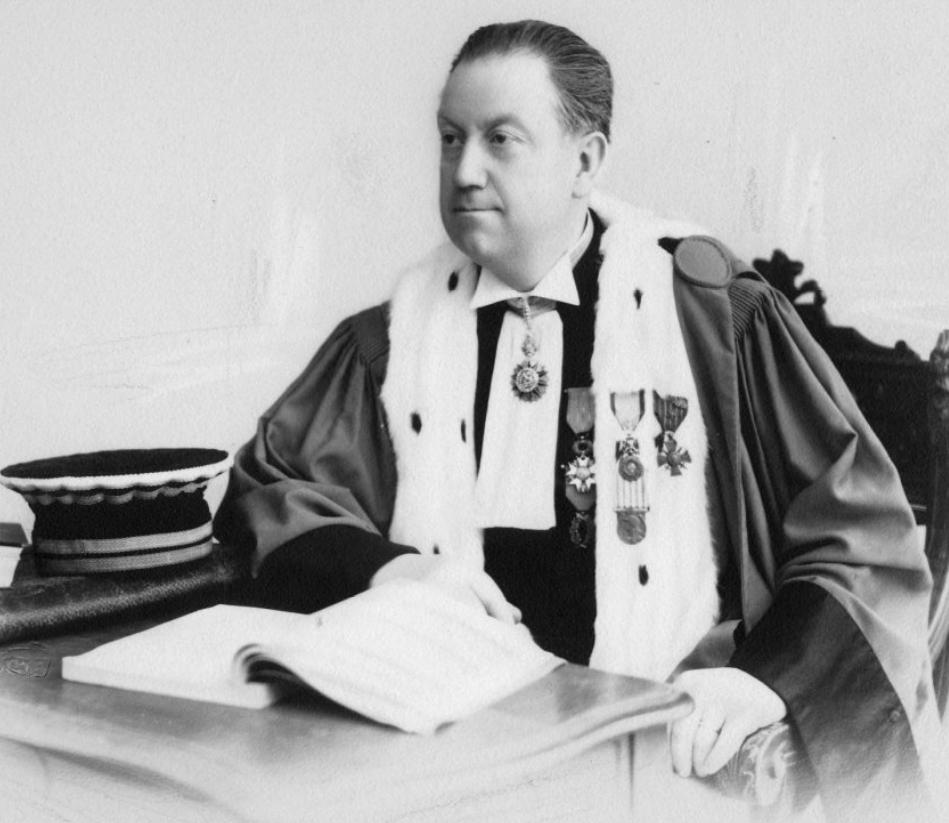 Procureur Général à Chambéry en septembre 1939.